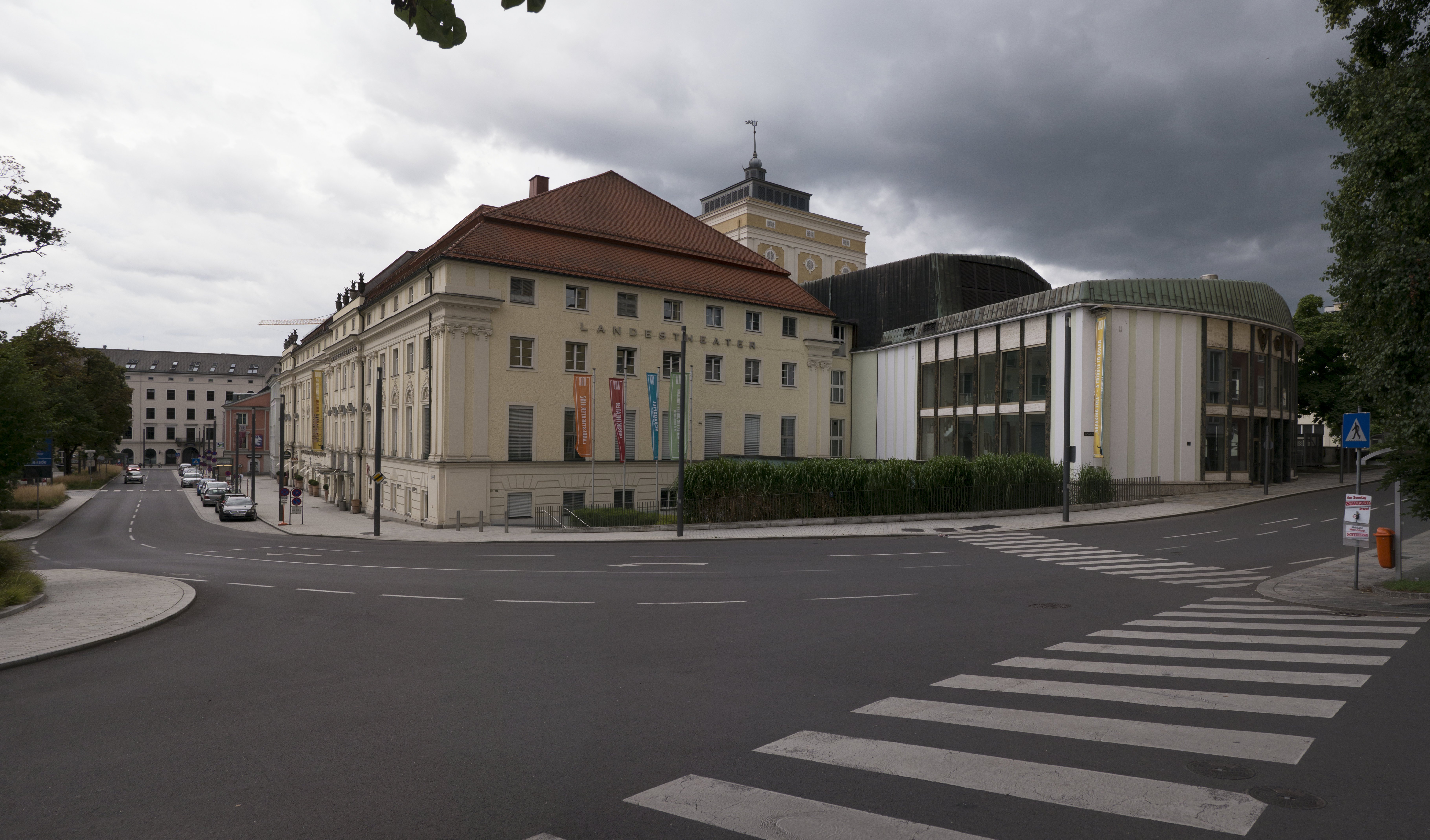 Landestheater, Kammerspiele, ehem. Casinogebäude